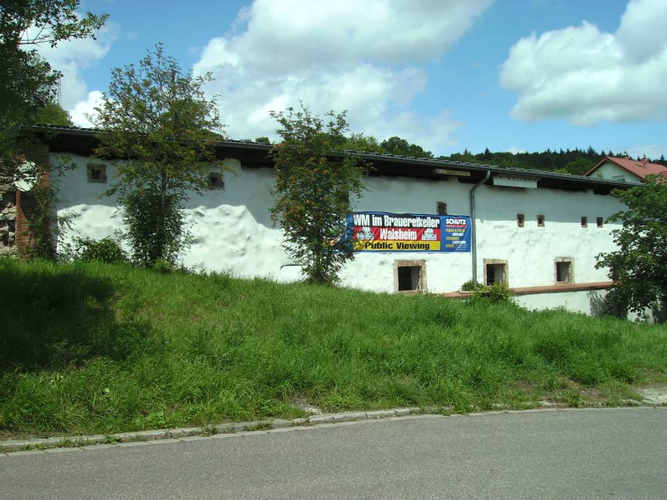 Gersheim-Walsheim: ehemaliger Brauereikeller der "Brauerei Walsheim"